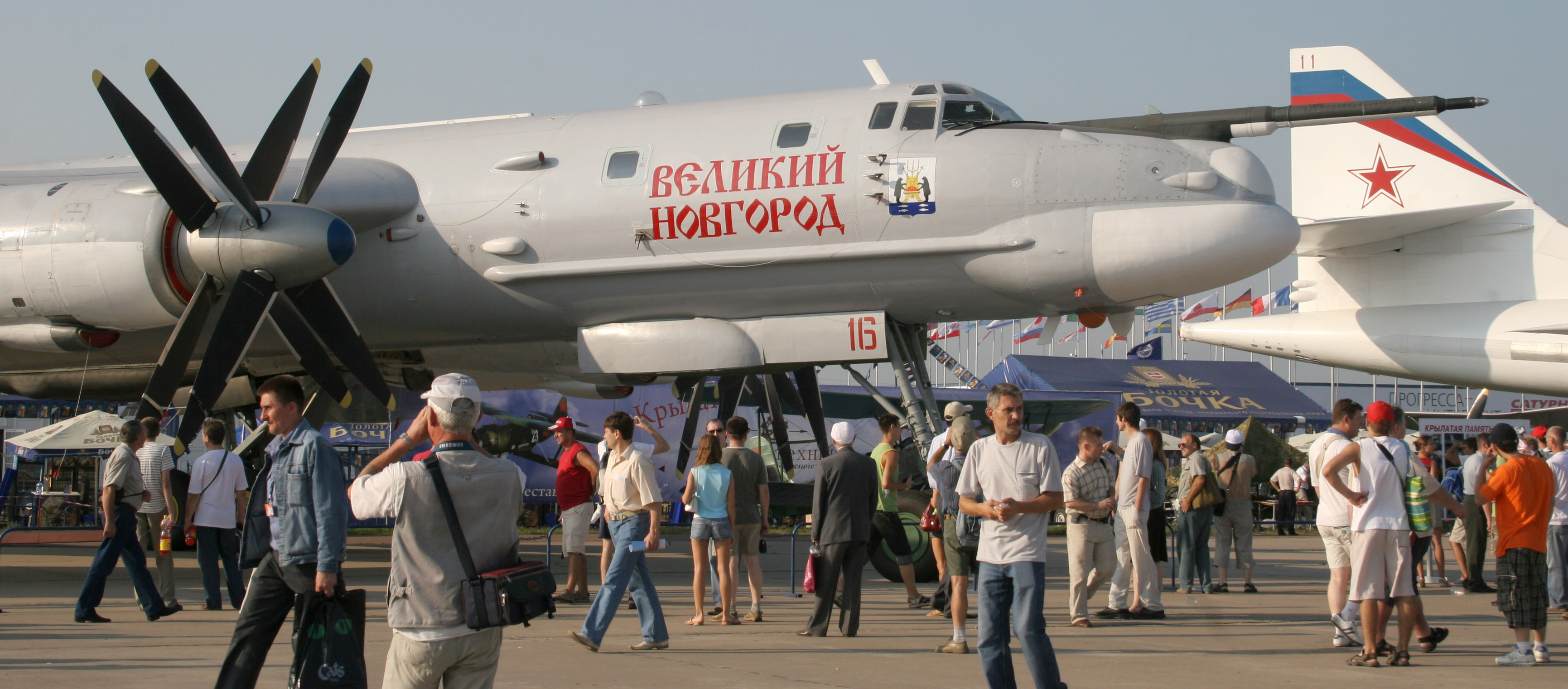 Самолёт Ту-95 "Великий Новгород". Экспозиция на МАКС-2007